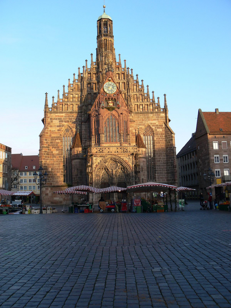 Liebfrauenkirche (church of Our Lady). Nurnberg, Bavaria, Germany